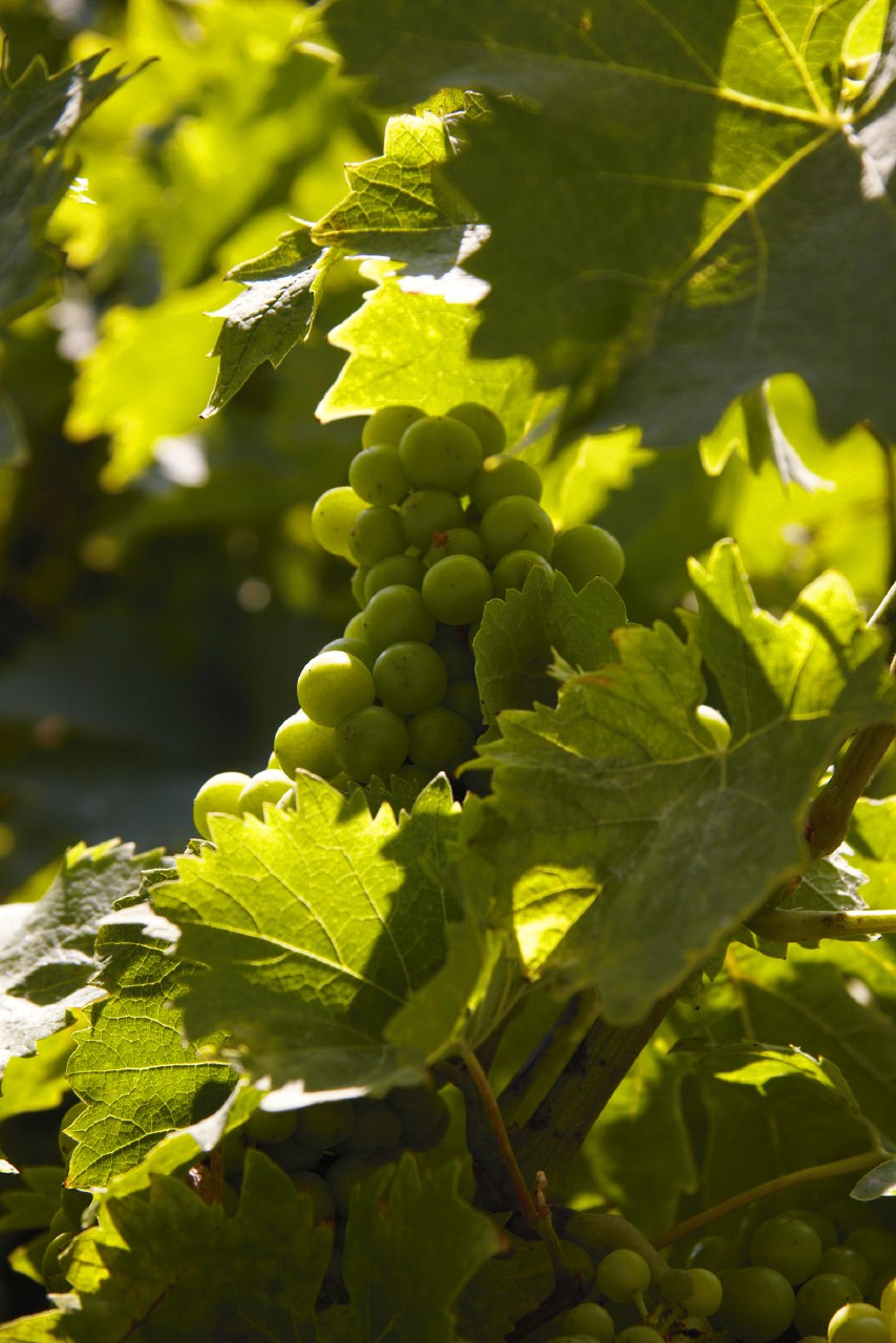 Виноград Метакса